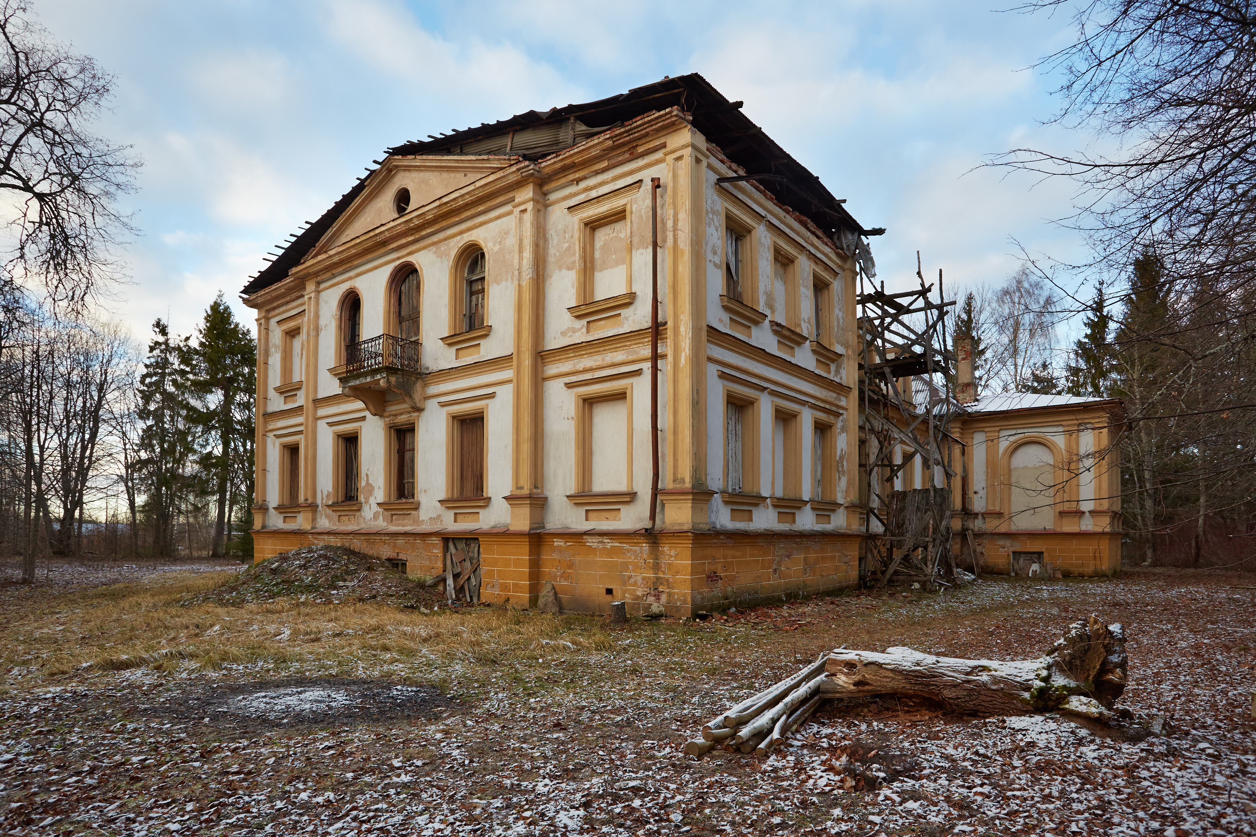 Vana-Nursi mõisa peahoone